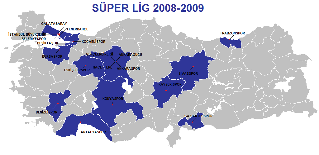 Turkcell Süper Lig Takımları'nın harta üzerinde gösterilmesi.Vikipedi'den aldığım resim üzerine yaptım.